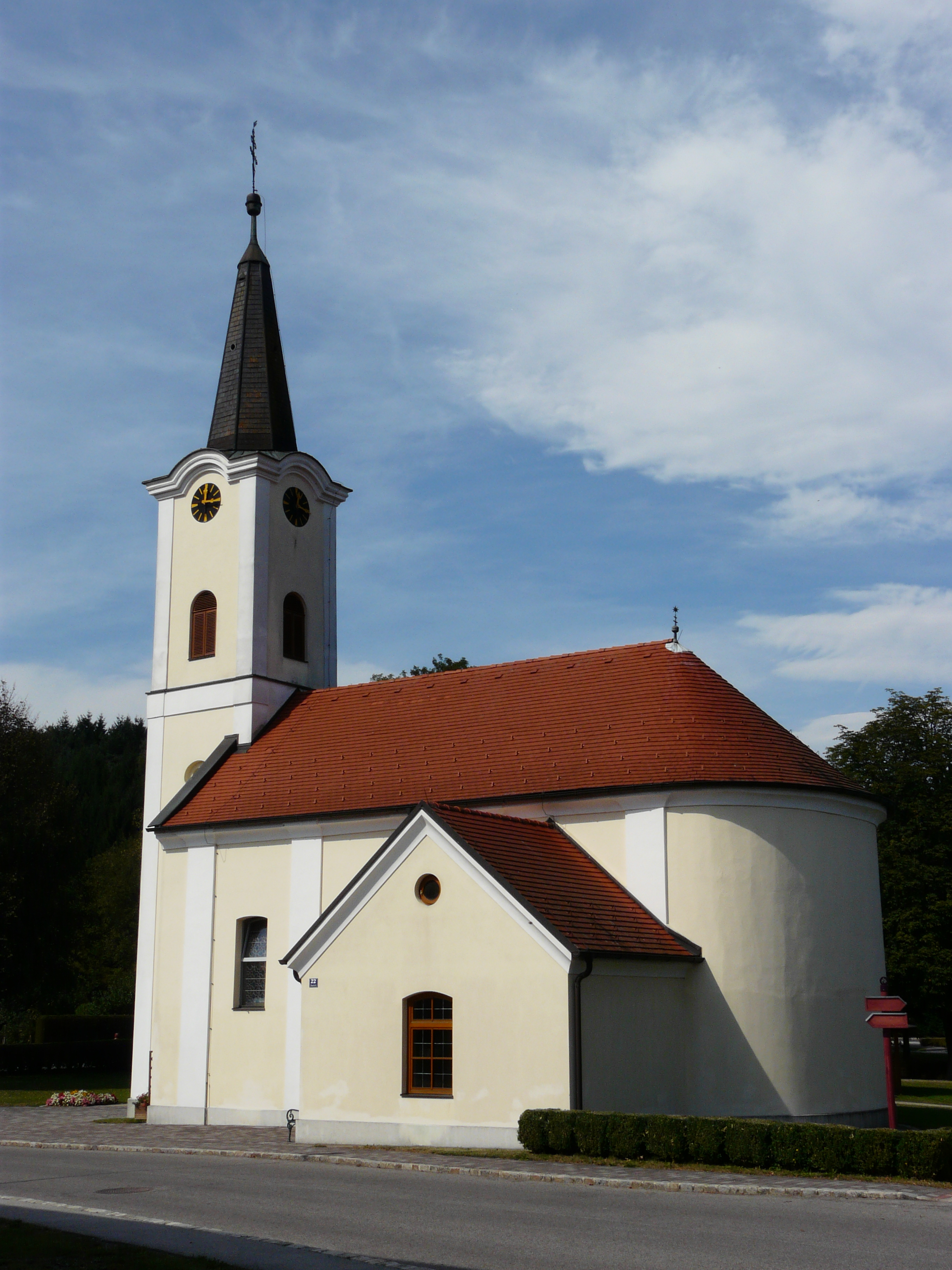 Lockenhaus - Langeck, Kath. Filialkirche hl . Johann von Nepomuk